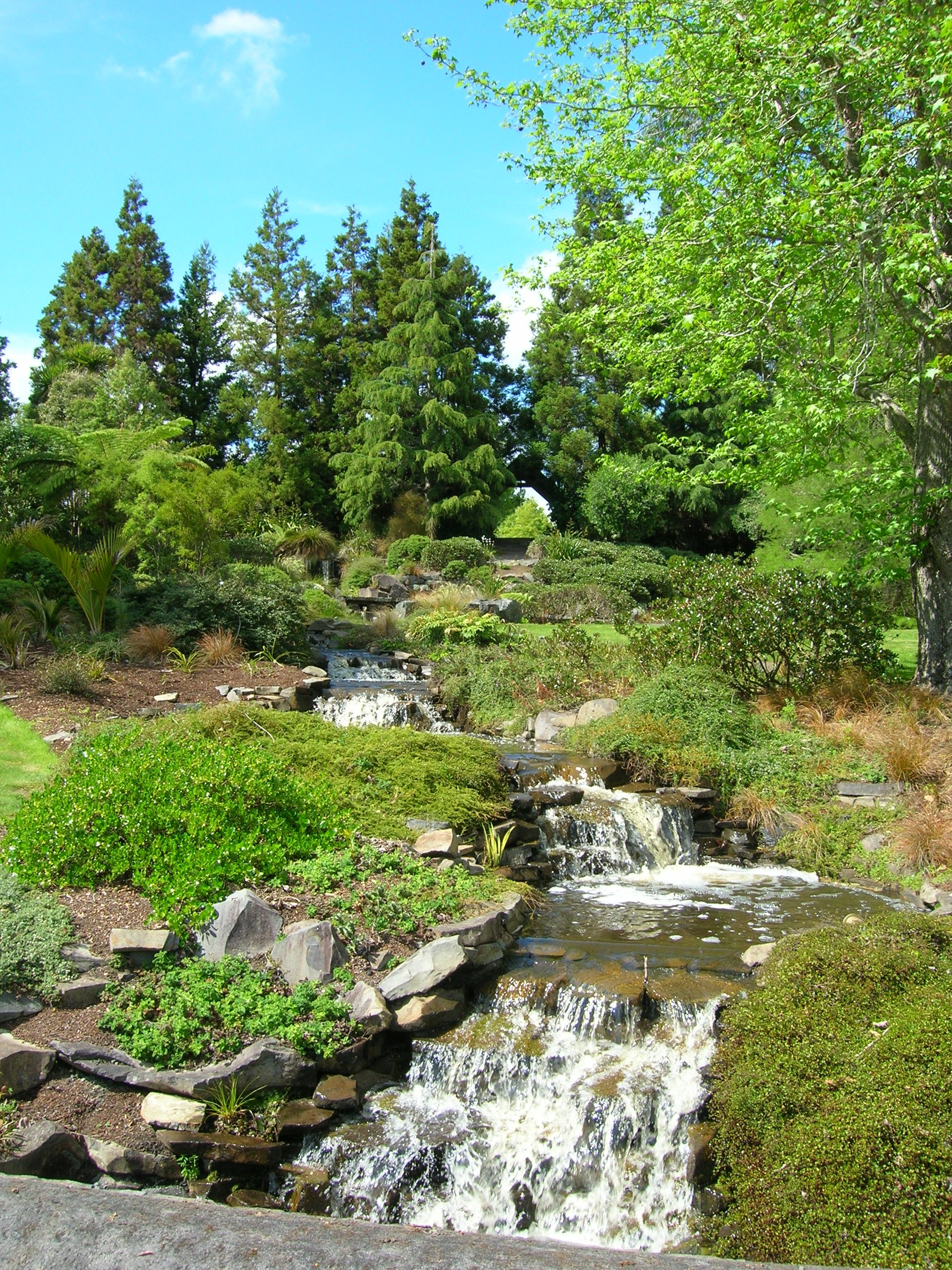 i103105 039